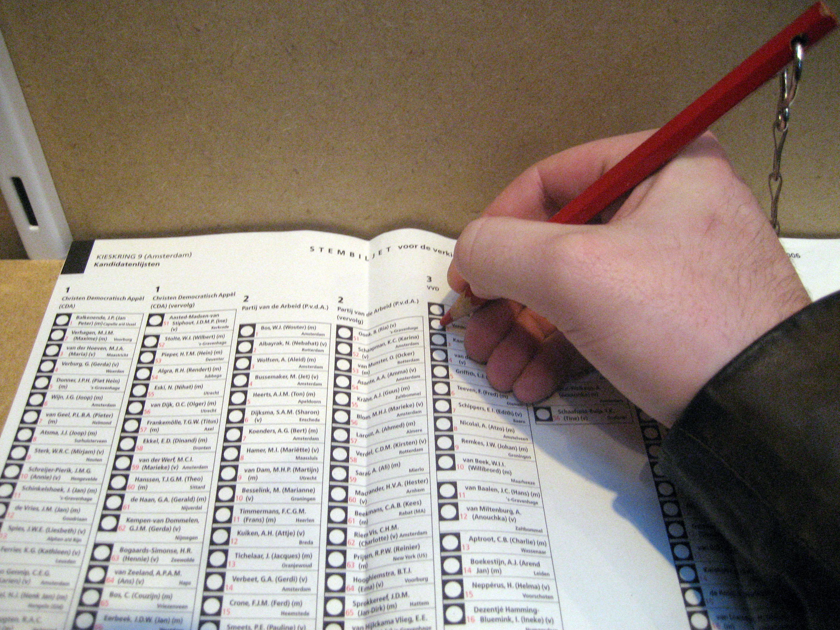 Stemmen op stembiljet met rood potlood.